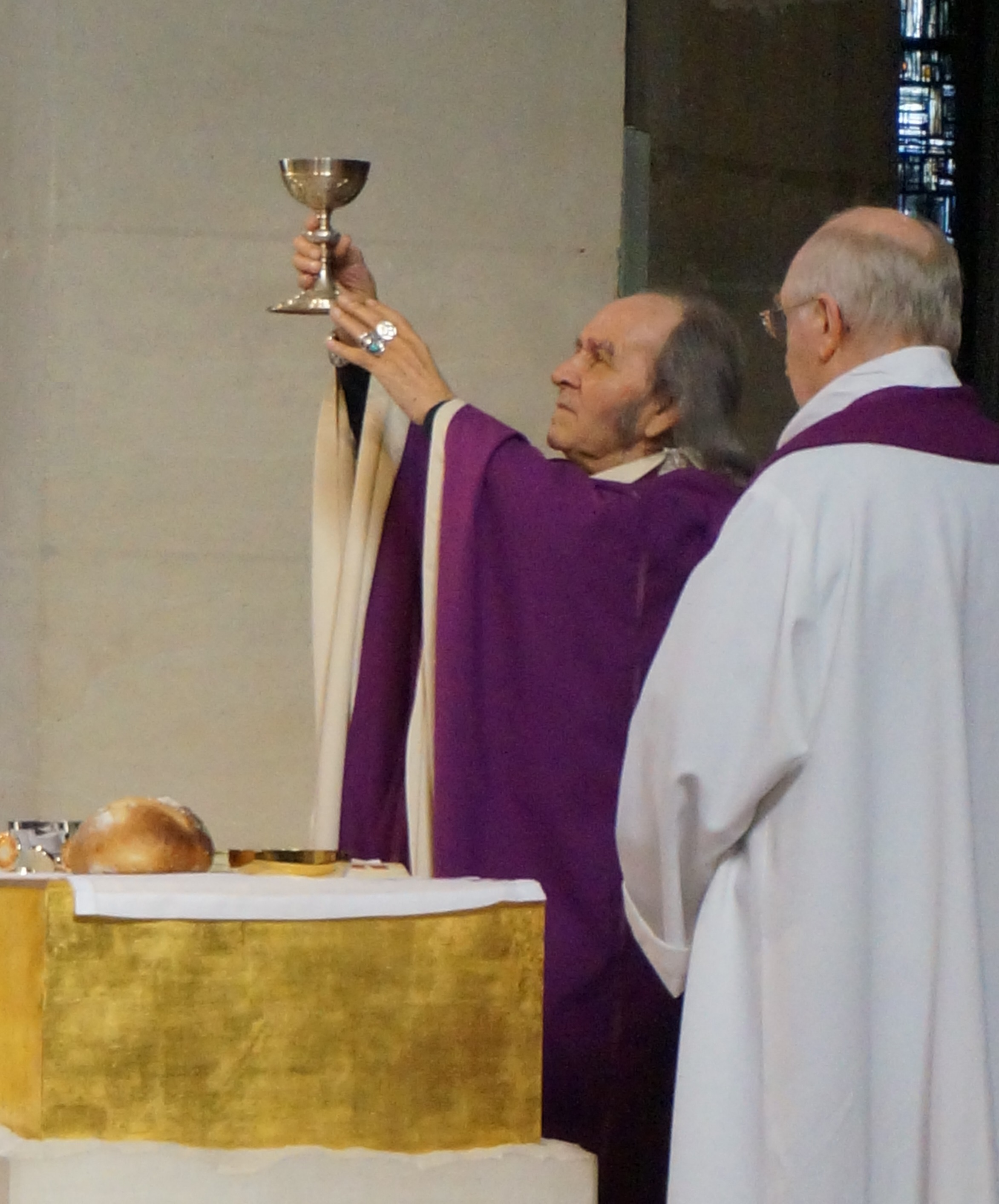 Gilbert célébrant la messe en l'église st-Jacques de Reims.